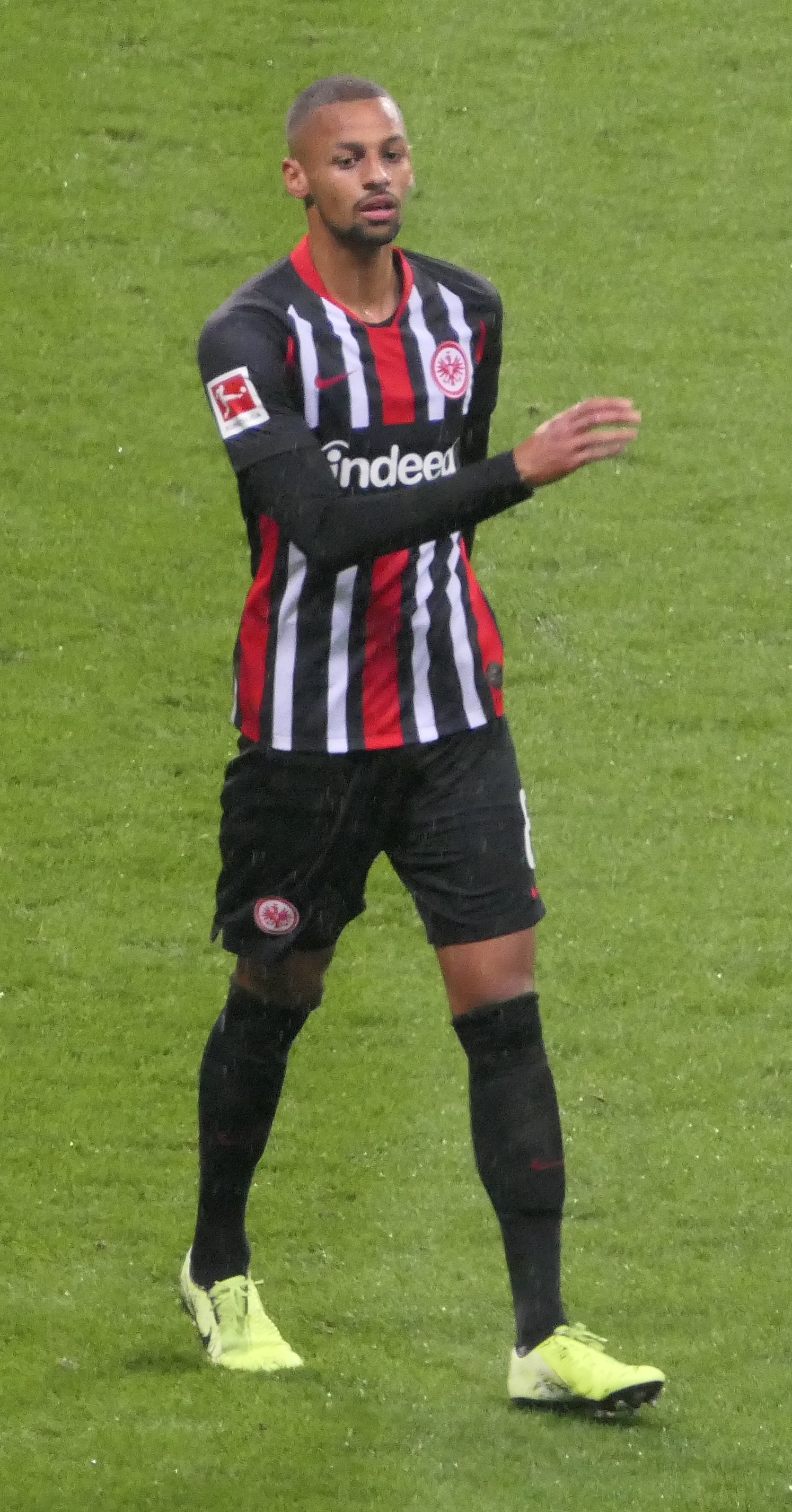 Der Fussballprofi Djibril Sow im Trikot von Eintracht Frankfurt beim Heimspiel gegen den SV Werder Bremen am 06.10.2019.